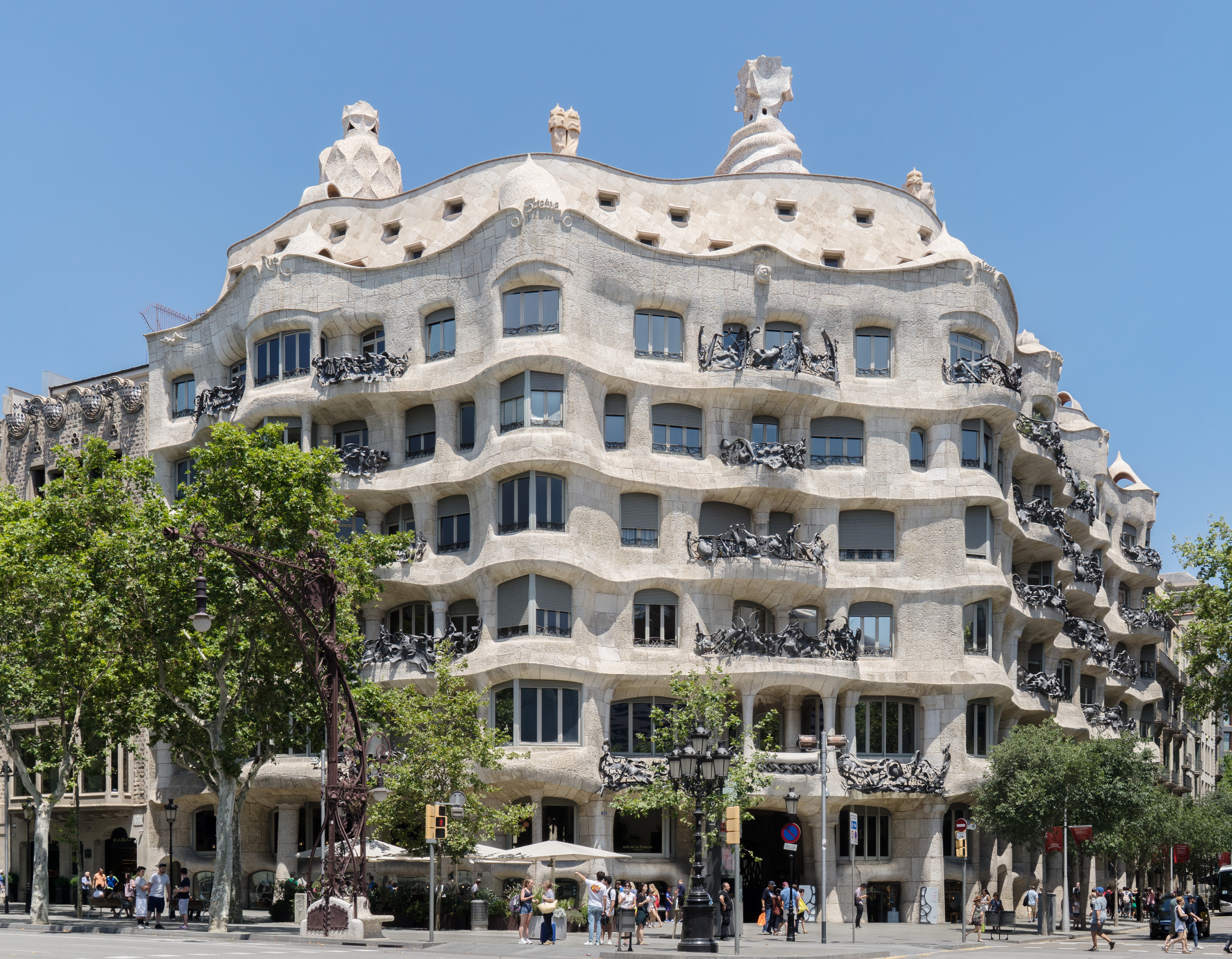 Casa Milà, general view, perspective corrected